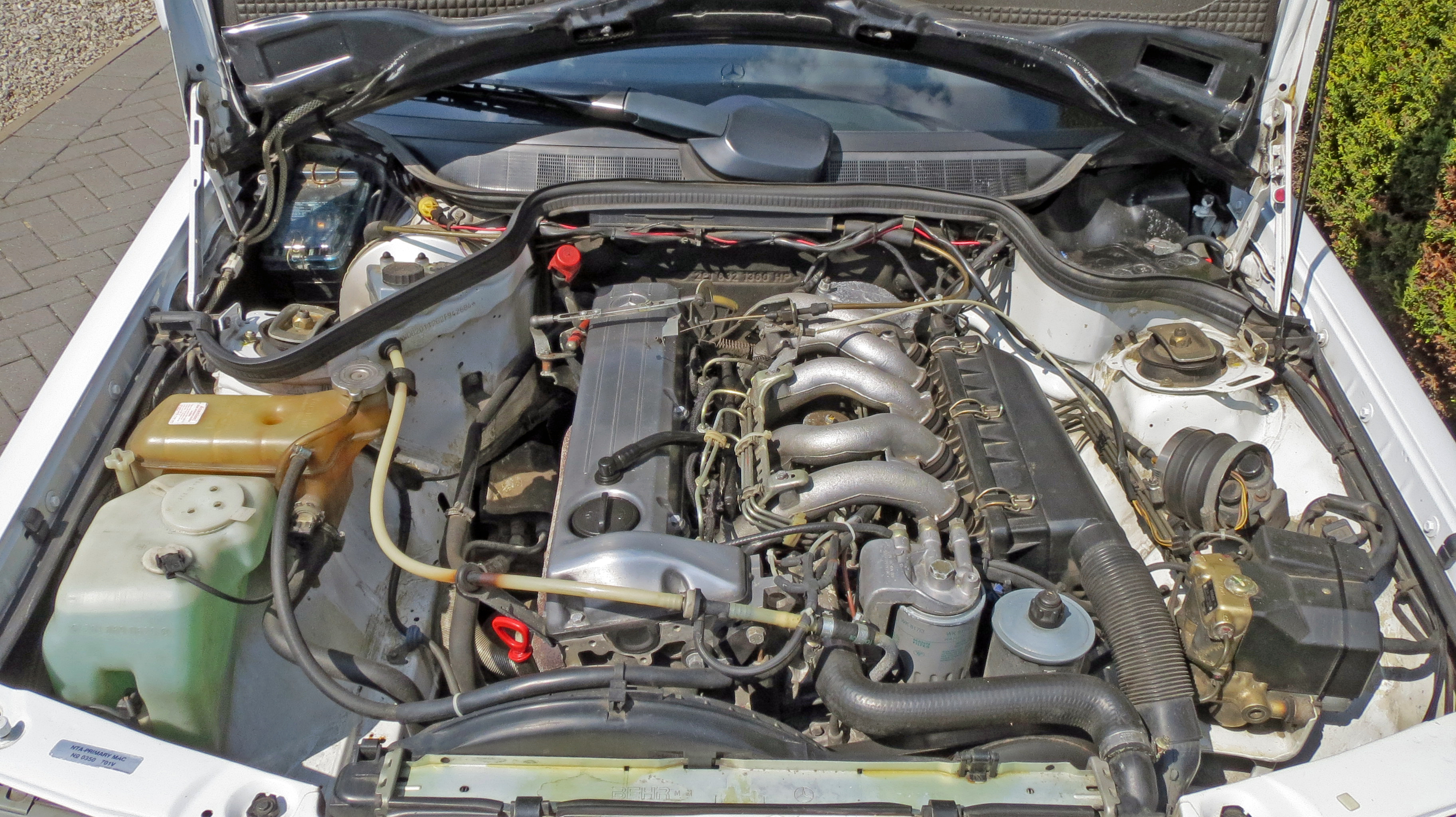 W201 190 d 2.5 auto